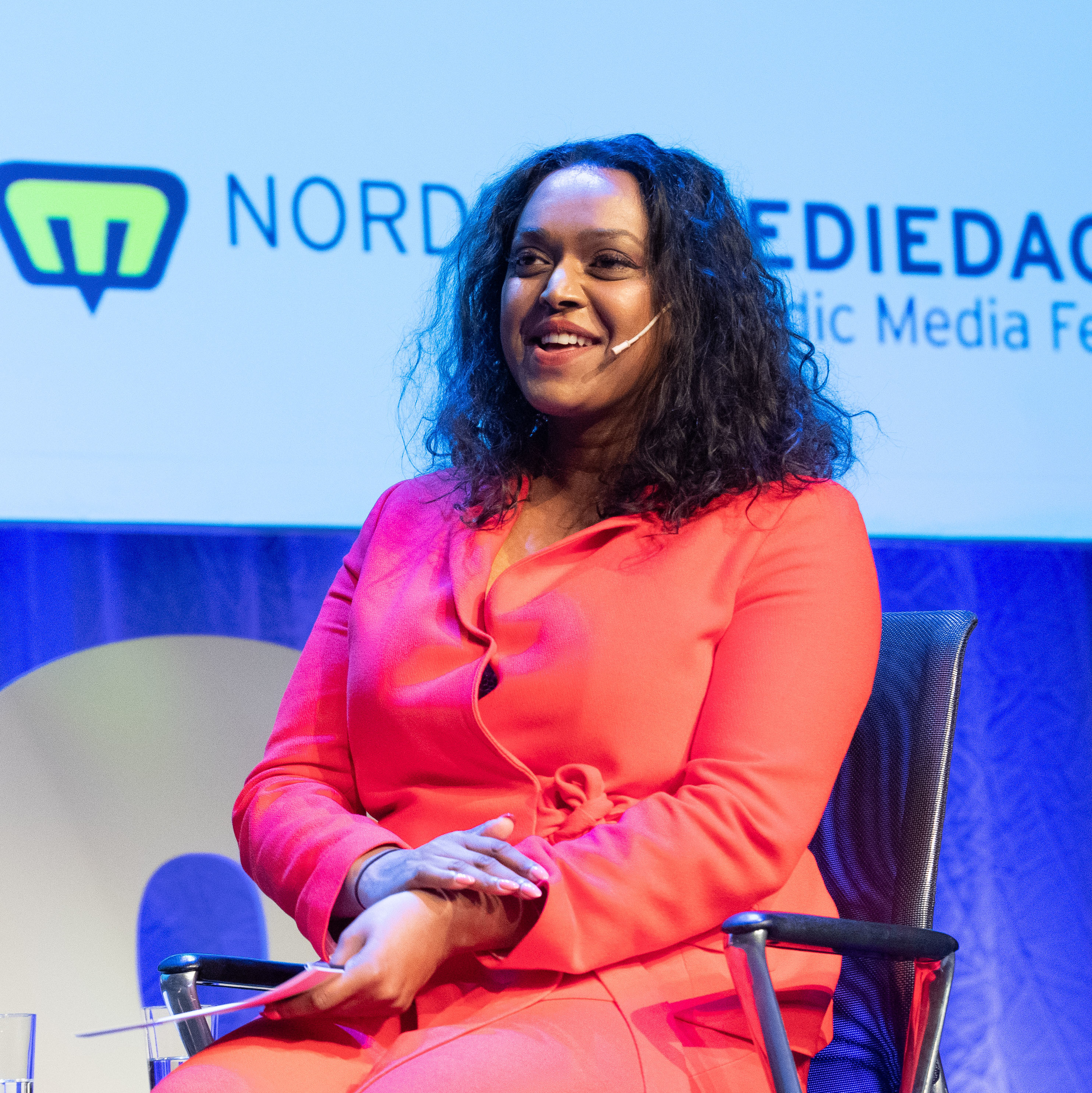 Aarebrotsamtalen